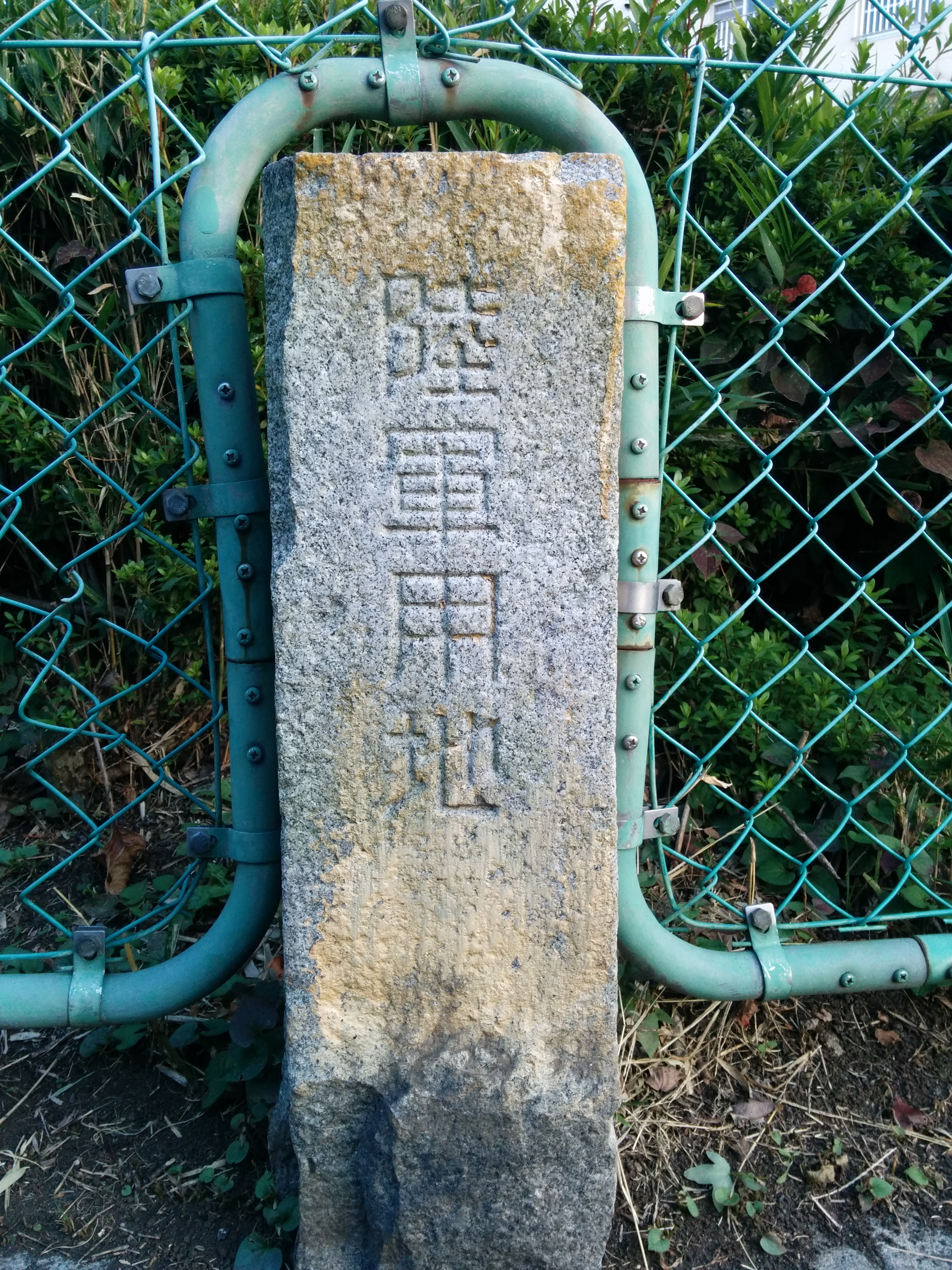 相模陸軍造兵廠の陸軍用地の杭